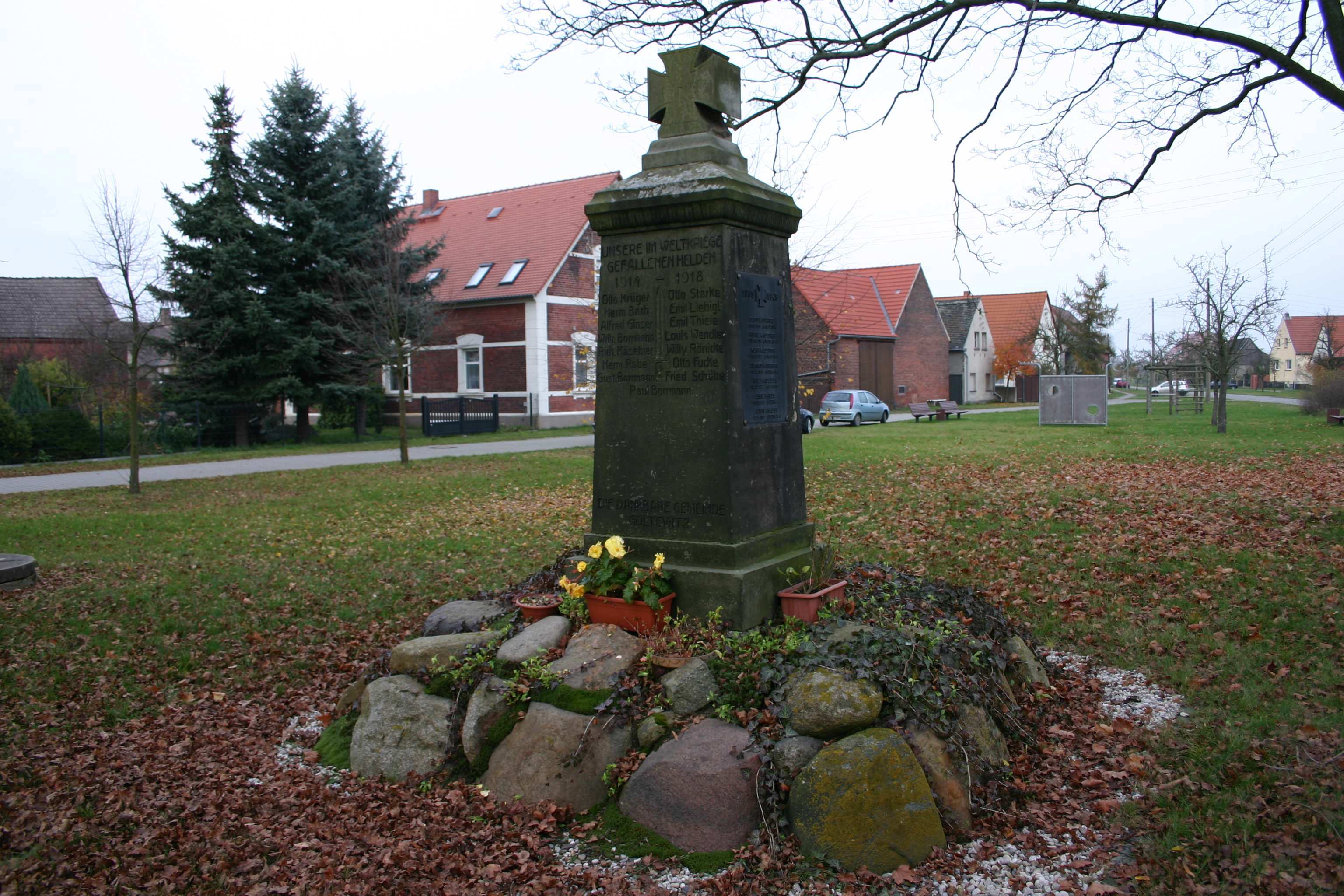 Das Kriegerdenkmal der Gemeinde Goltewitz mit den Namen der im Ersten und Zweiten Weltkrieg Gefallenen. Goltewitz ist ein Ortsteil der Stadt Oranienbaum.